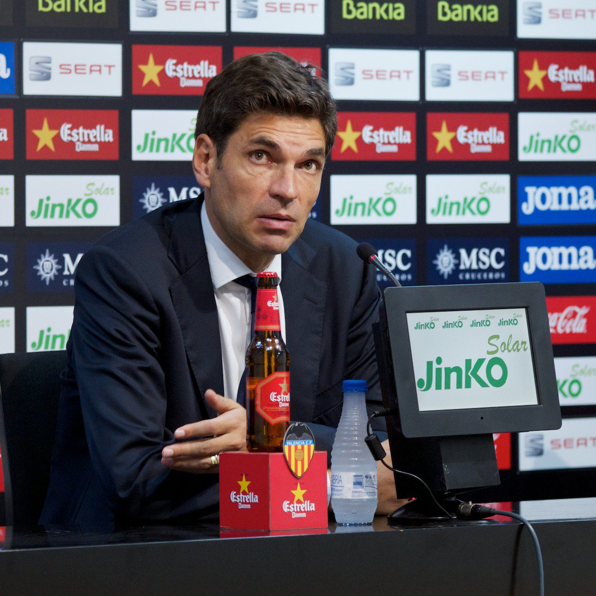 L'entraineur Mauricio Pellegrino (Valencia CF) le 17.11.2012.